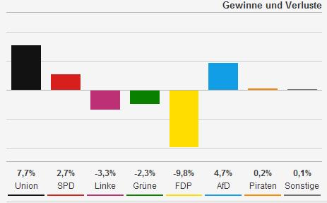 한국어 (조선): 2013년 독일연방연합의 선거 승리와 패배입니다